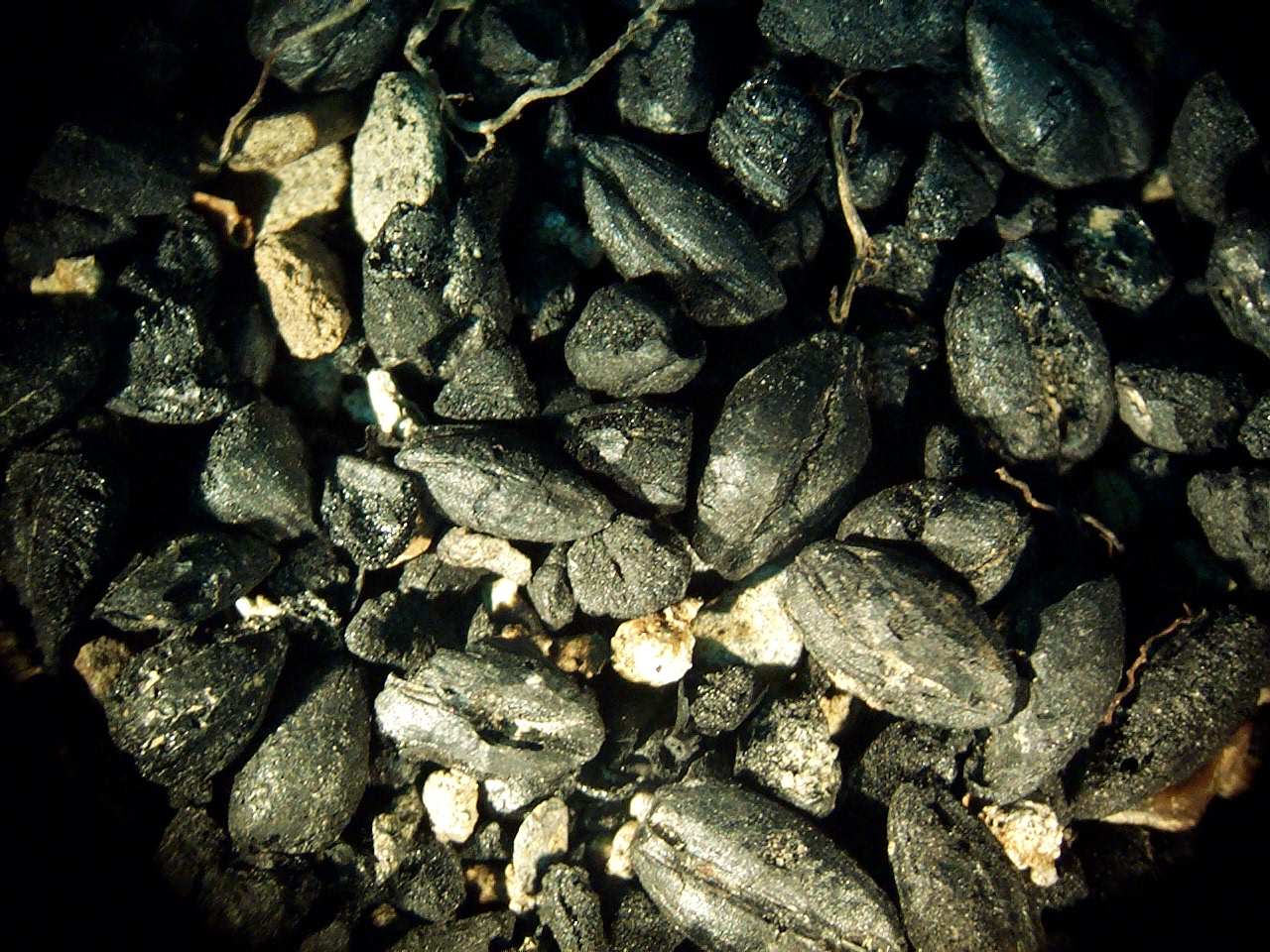 échantillon carpologique contenant des graines carbonisées.